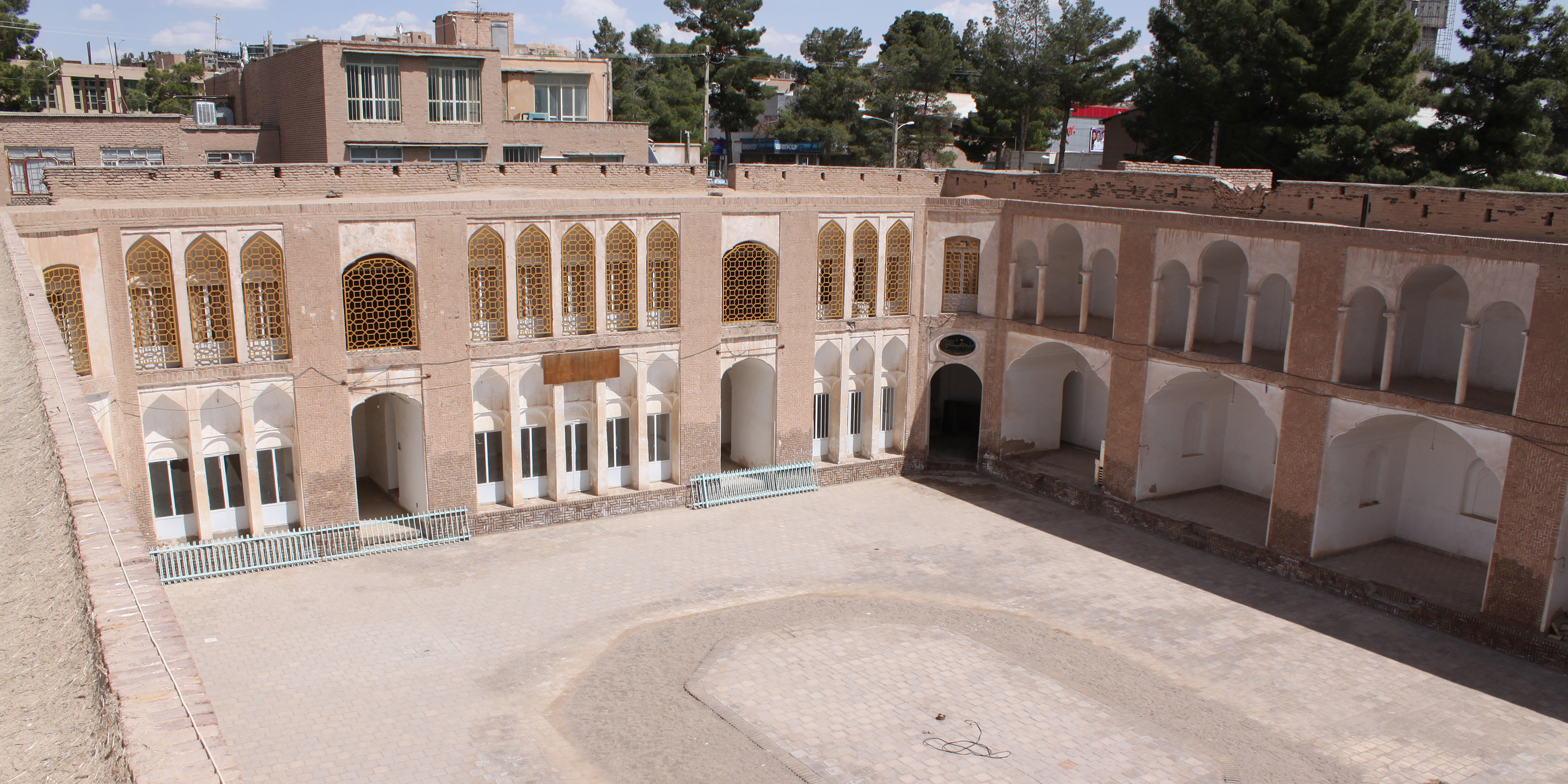 حسینیه شوکتیه